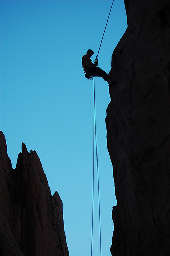 Rappel